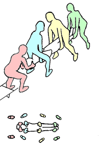 image:vertical_lifting_head.png Relevage : méthode du pont amélioré, le brancard venant par la tête. Image du haut : vue de trois-quart en plongée. Image du bas : vue de dessous. Auteur : Christophe Dang Ngoc Chan (Cdang), réalisé avec un programme de dessin dessin original numérisé, retouché avec un logiciel de dessin.